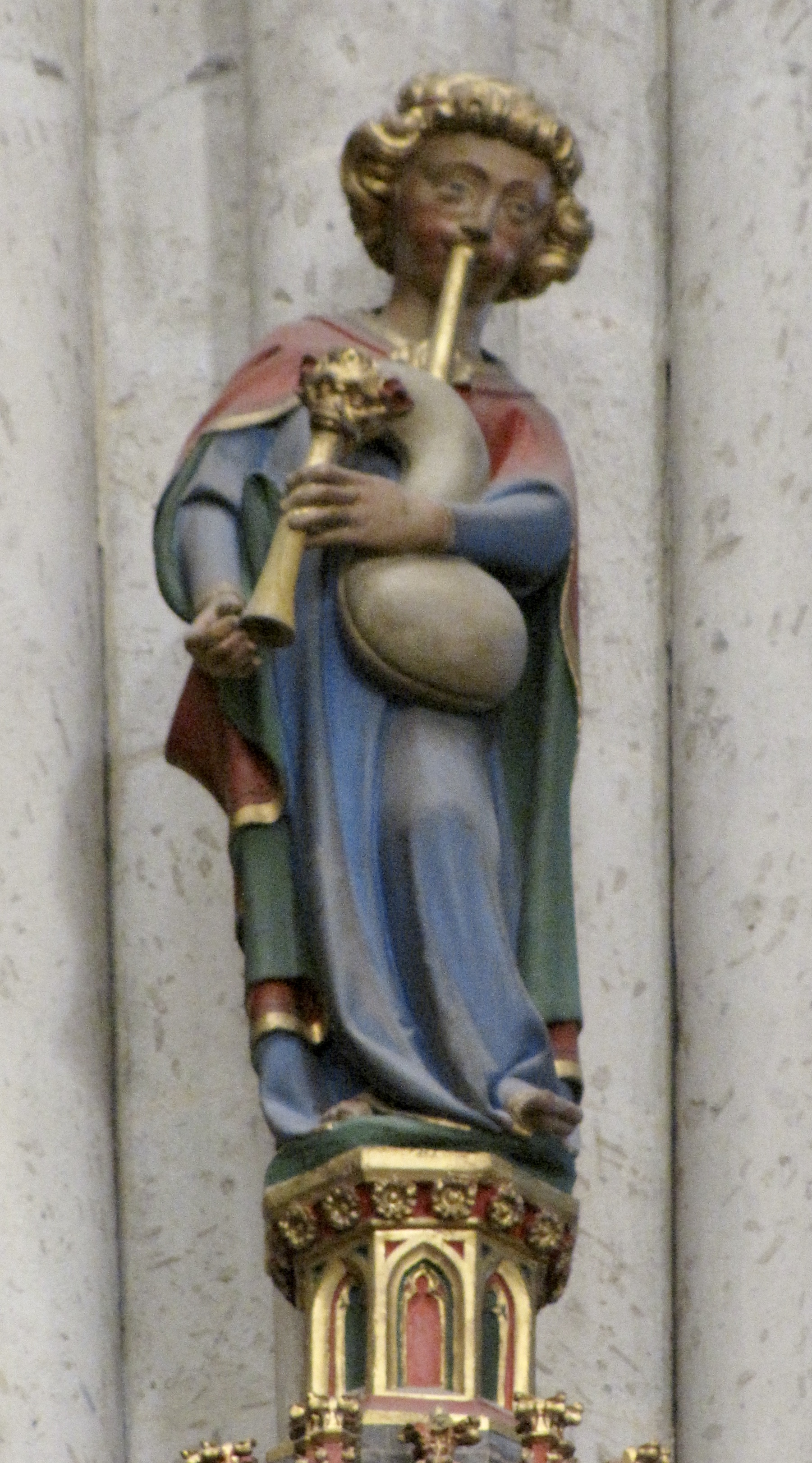 Kölner Dom: Engel mit Sackpfeife über Apostel Jakobus Maior. Detail einer der 14 Chorpfeilerfiguren, geschaffen zwischen 1320 und 1340 von der Kölner Dombauhütte unter Leitung von Dombaumeister Johannes. Tuffstein, bunt bemalt. Zählt zu den Hauptwerken Europäischer Bildhauerkunst im beginnenden 14. Jhd.